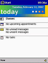 tele inicial do pocket pc 2000